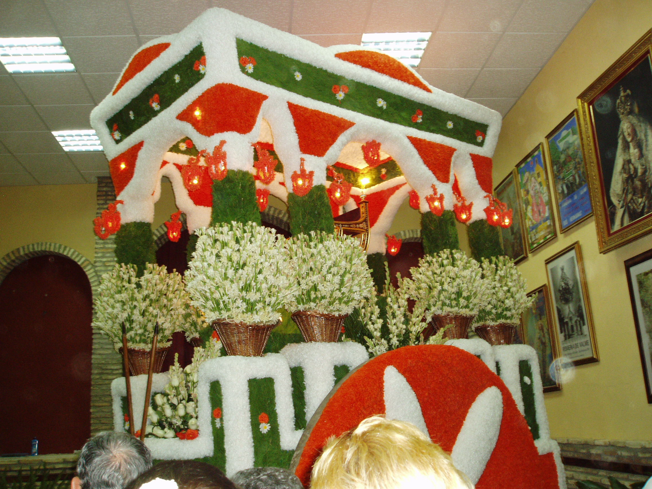 Carroza de la Virgen de Valme el día anterior a su Romería (hoy 15/10/2006) Dos Hermanas Es de mi colección particular